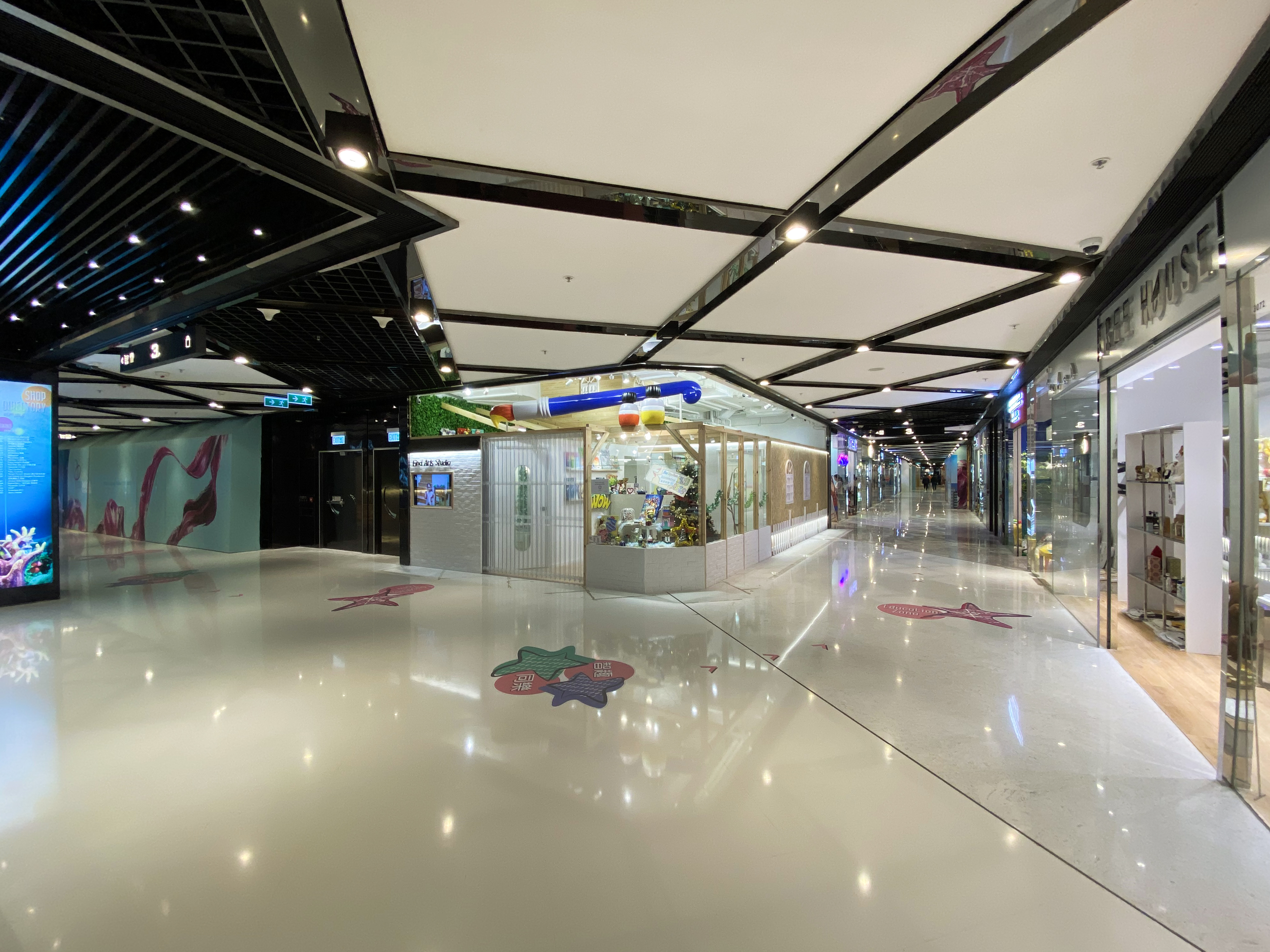 OP Mall Level 3